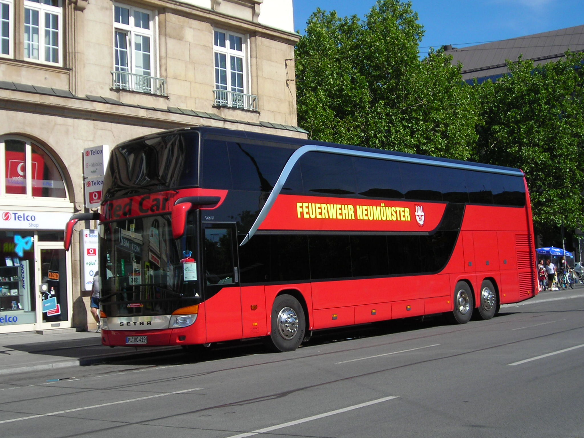 Setra S431 DT, Bus der Feuerwehr Neumünster ("Red Car"), Gesamtansicht vorne links (gesehen in München, Sonnenstr.)